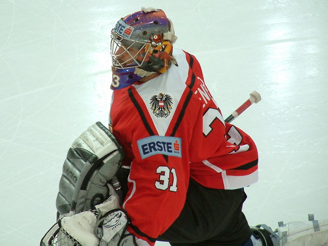 Österreichischer Nationaltorwart Jürgen Penker bei der WM 2005